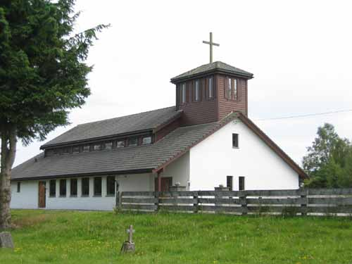 Hundvakoy kapell i Austevoll kommun, Hordaland, Norge.